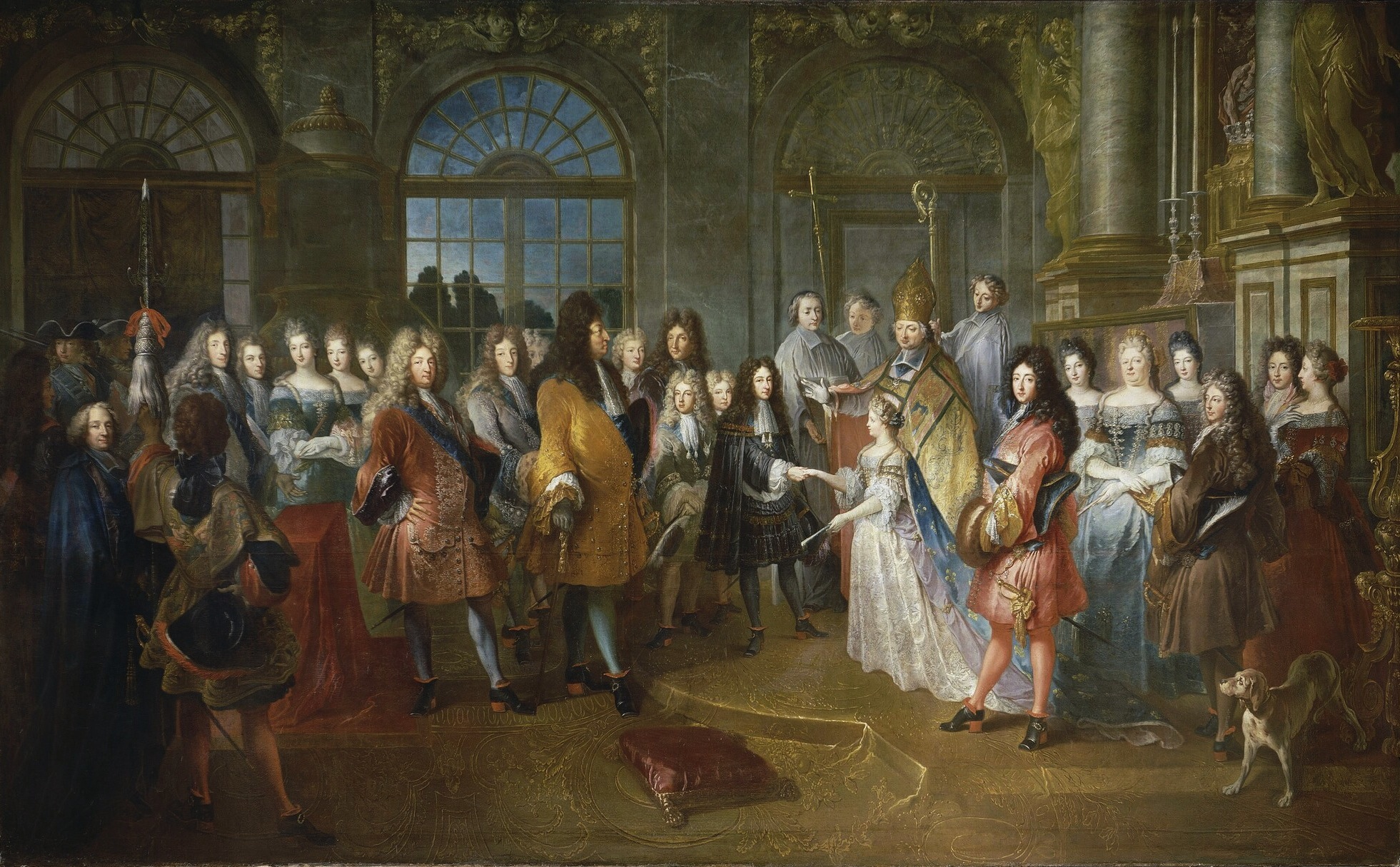 Mariage de Louis de France, duc de Bourgogne et de Marie-Adélaïde de Savoie, célébré le 7 décembre 1697 par le cardinal de Coislin, huile sur toile, 1715, carton de tapisserie commandé par Louis XIV pour la manufacture royale des Gobelins en 1710, pour la tenture de l'histoire du roi.